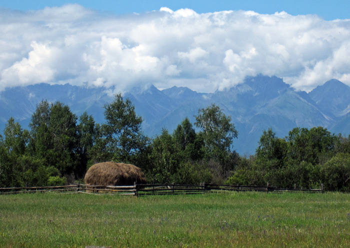 Тункинская долина в районе с.Жемчуг